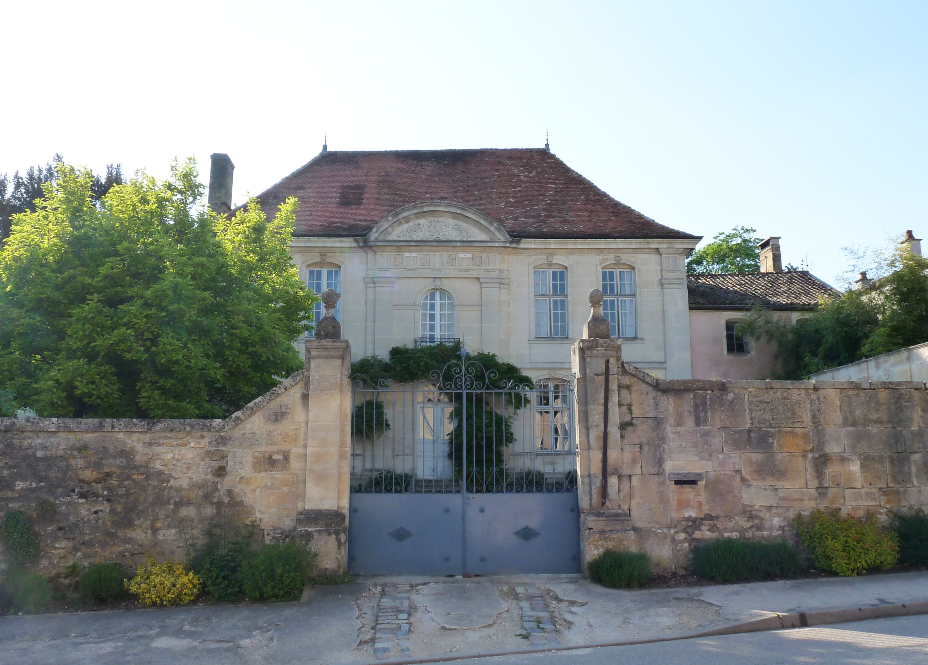 Château de la Forge (ou Maison des Bourbons) à Haironville (Meuse). Inscrit aux Monuments historiques en 1947.